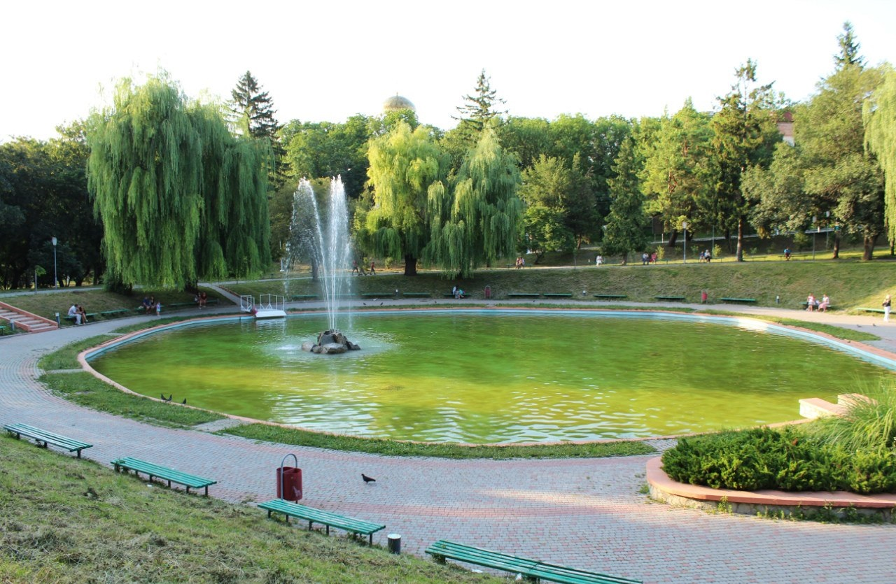 Парк "Гунські криниці" в м. Кам'янець-Подільському